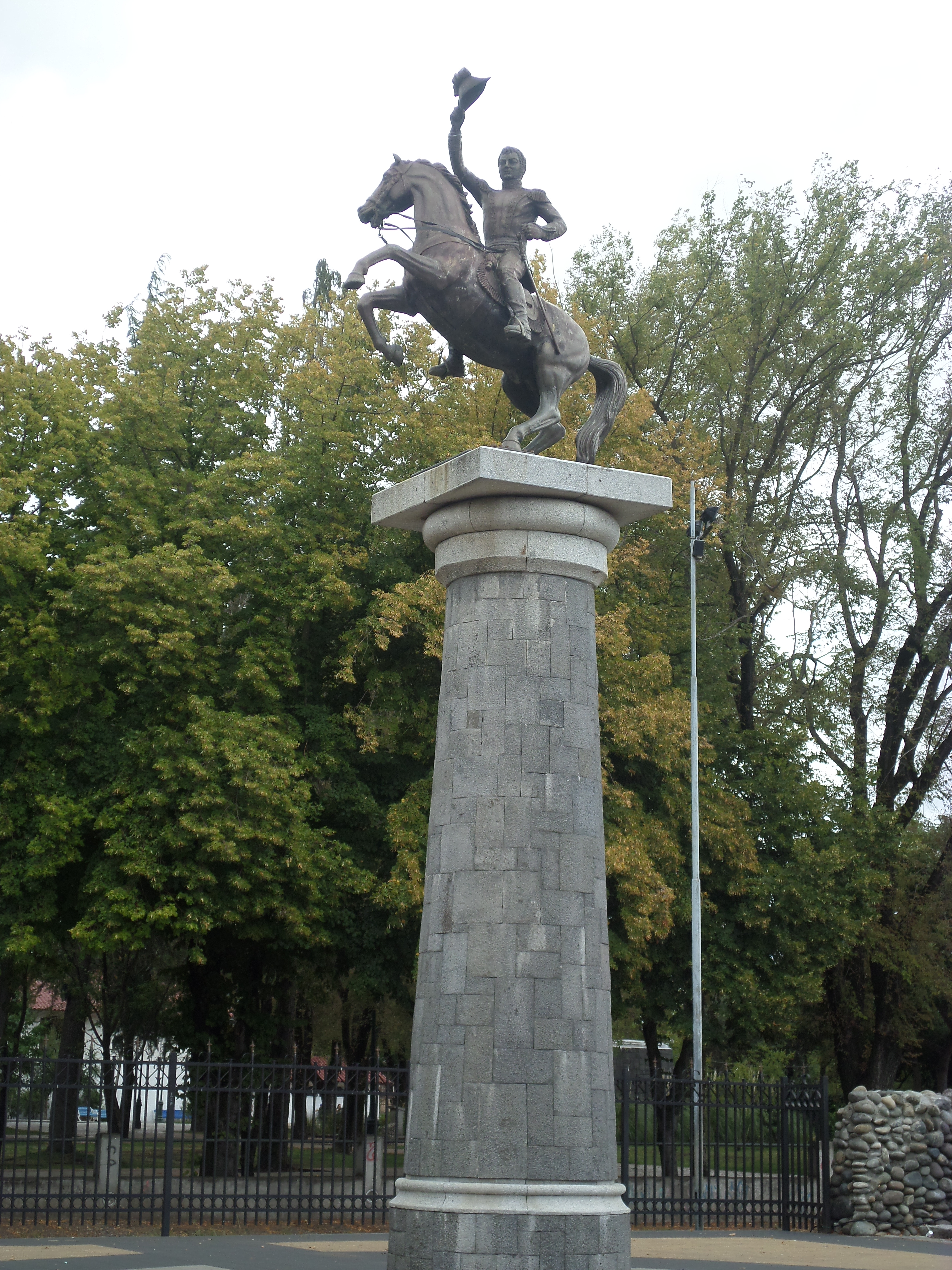 En chillàn viejo